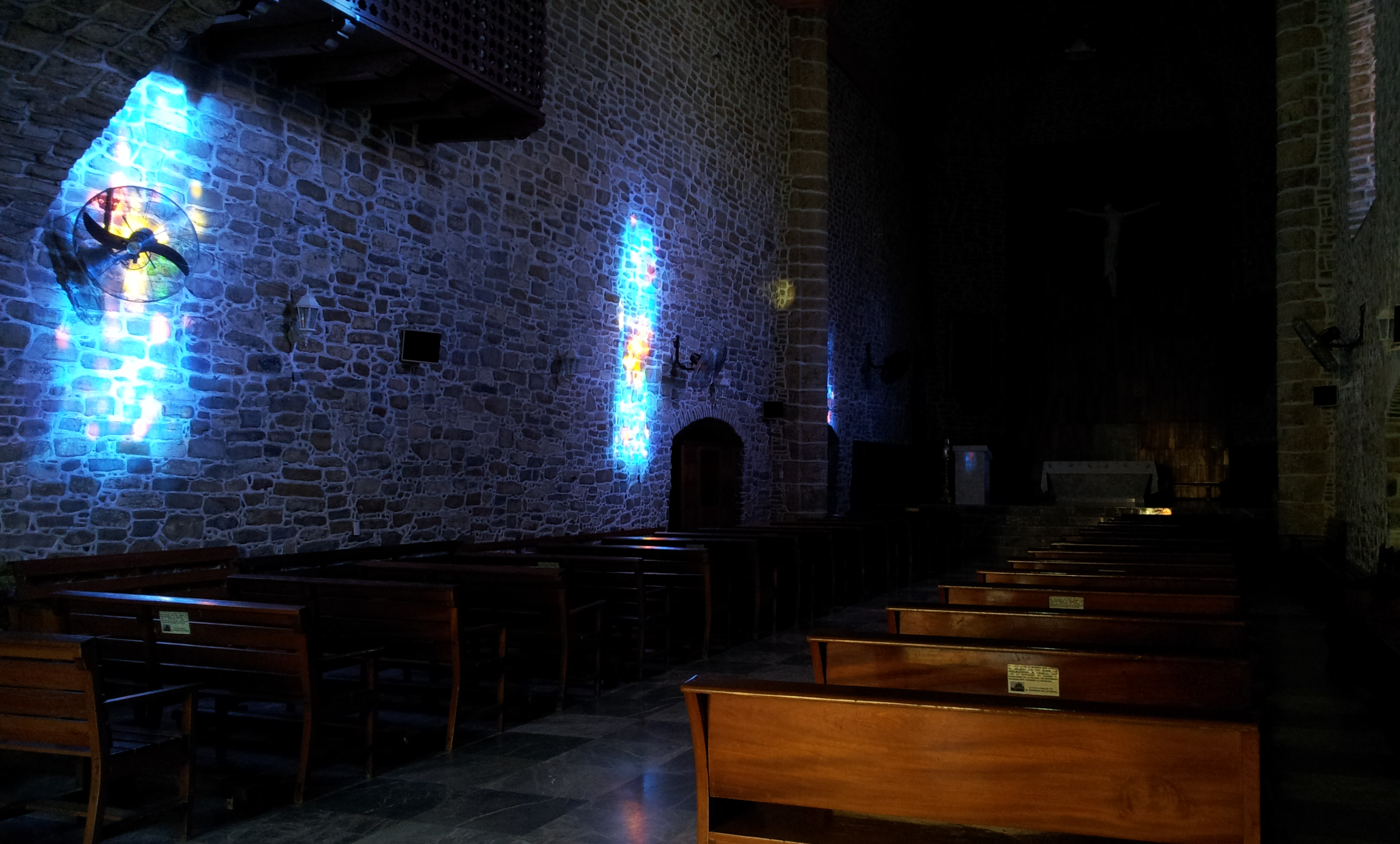 Catedral de Huejutla 2.1 (Android).